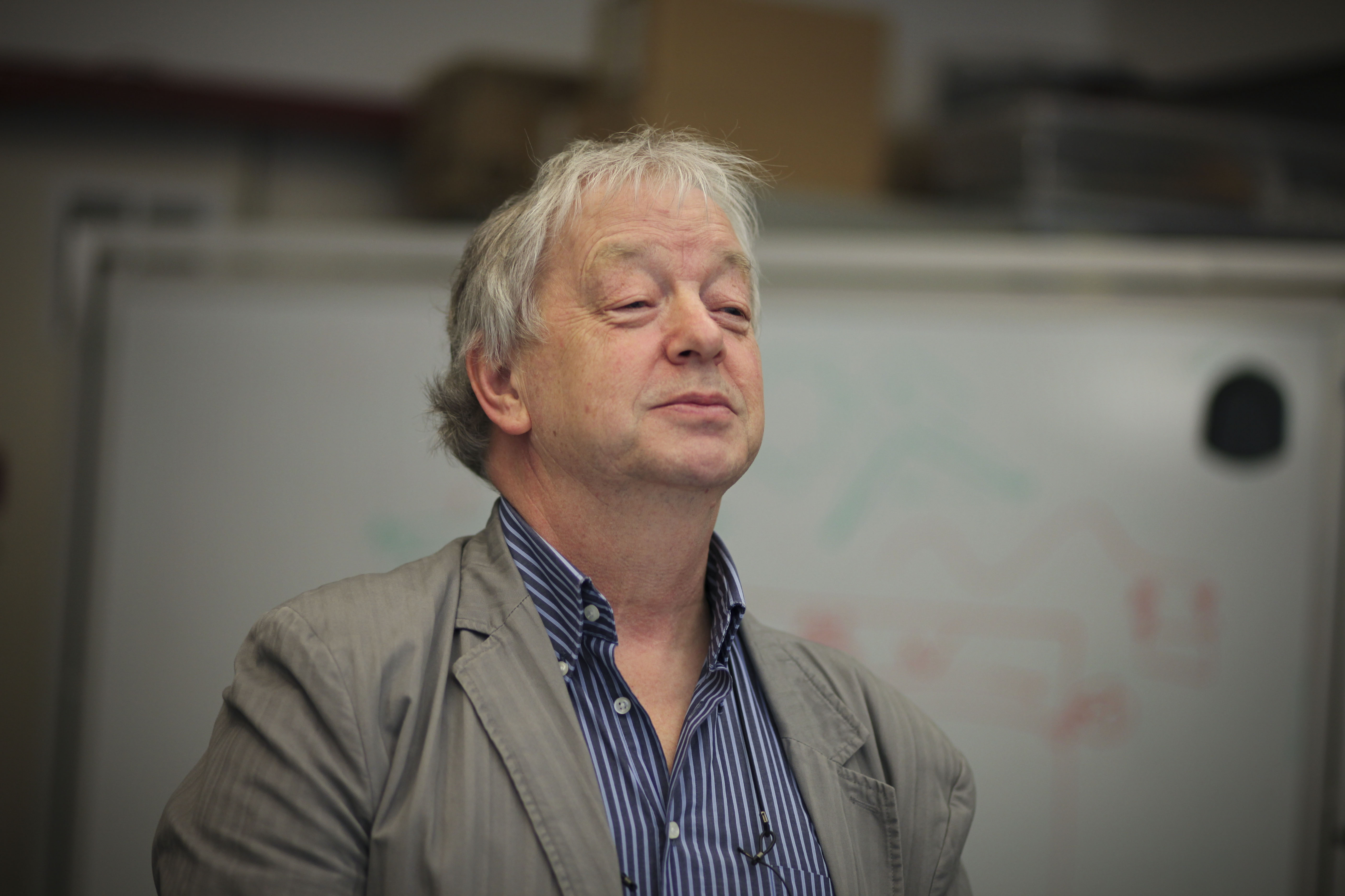 Fotografía de Paul Mijksenaar